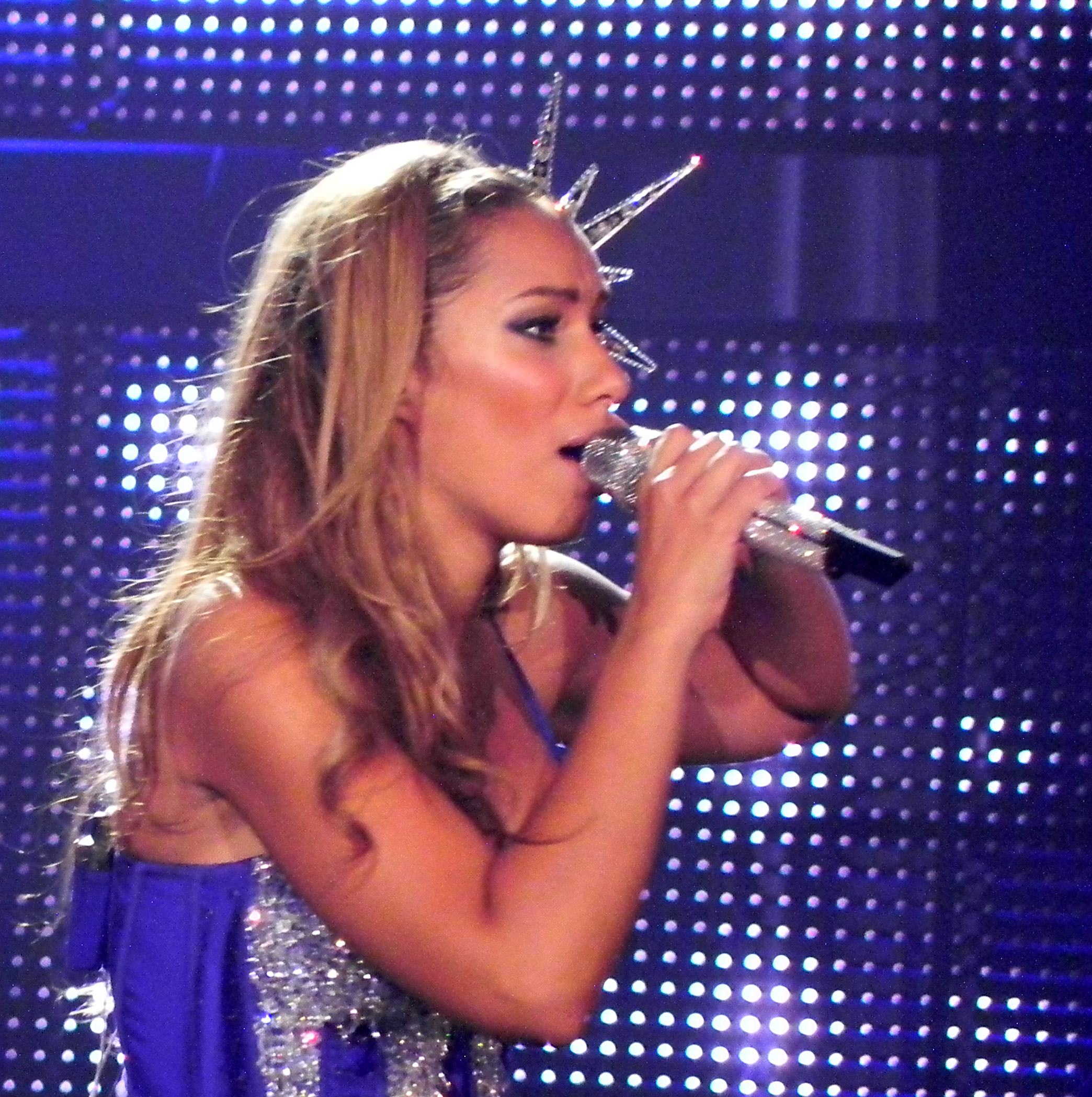 Leona Lewis durante a sua turnê "The Labyrinth" (em português: O Labirinto)